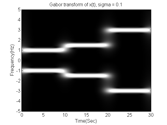 Gabor Transform with Sigma = 0.1